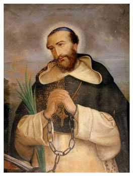 Ðức Cha Vinh (Valentinô Berrio Ochoa Vinh)